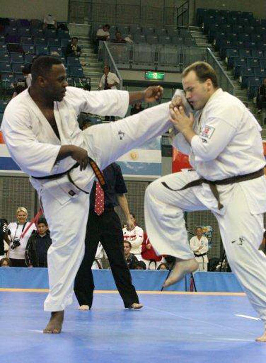 JODAN